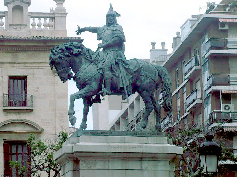 Estatua ecuestre del rey Jaime I de Aragón, Mallorca y Valencia, en la plaza de Alfonso el Magnanimo de Valencia, también conocida como el Parterre.